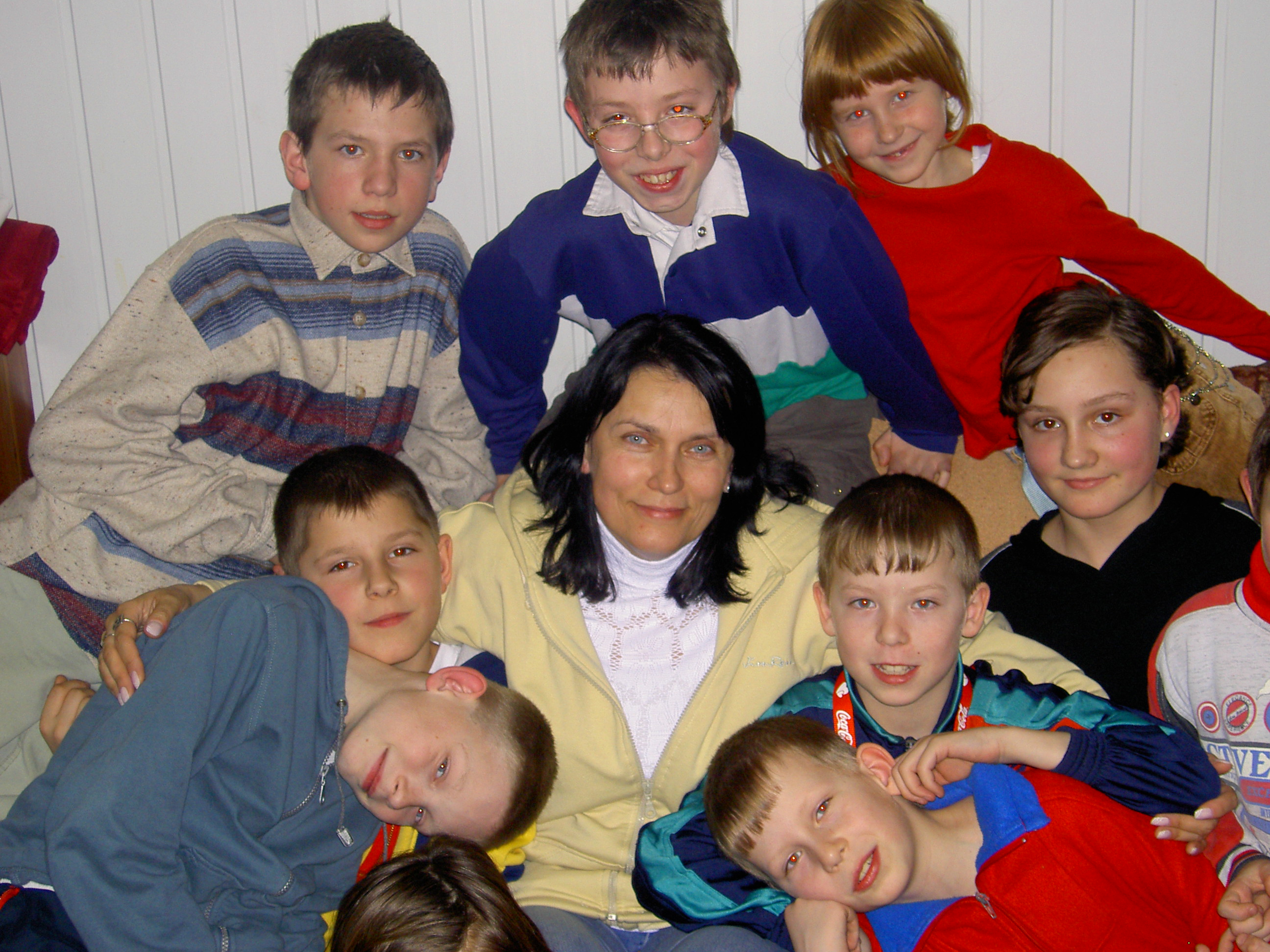 Ewa Chrobak-Szota, twórczyni wizerunku Orderu Uśmiechu